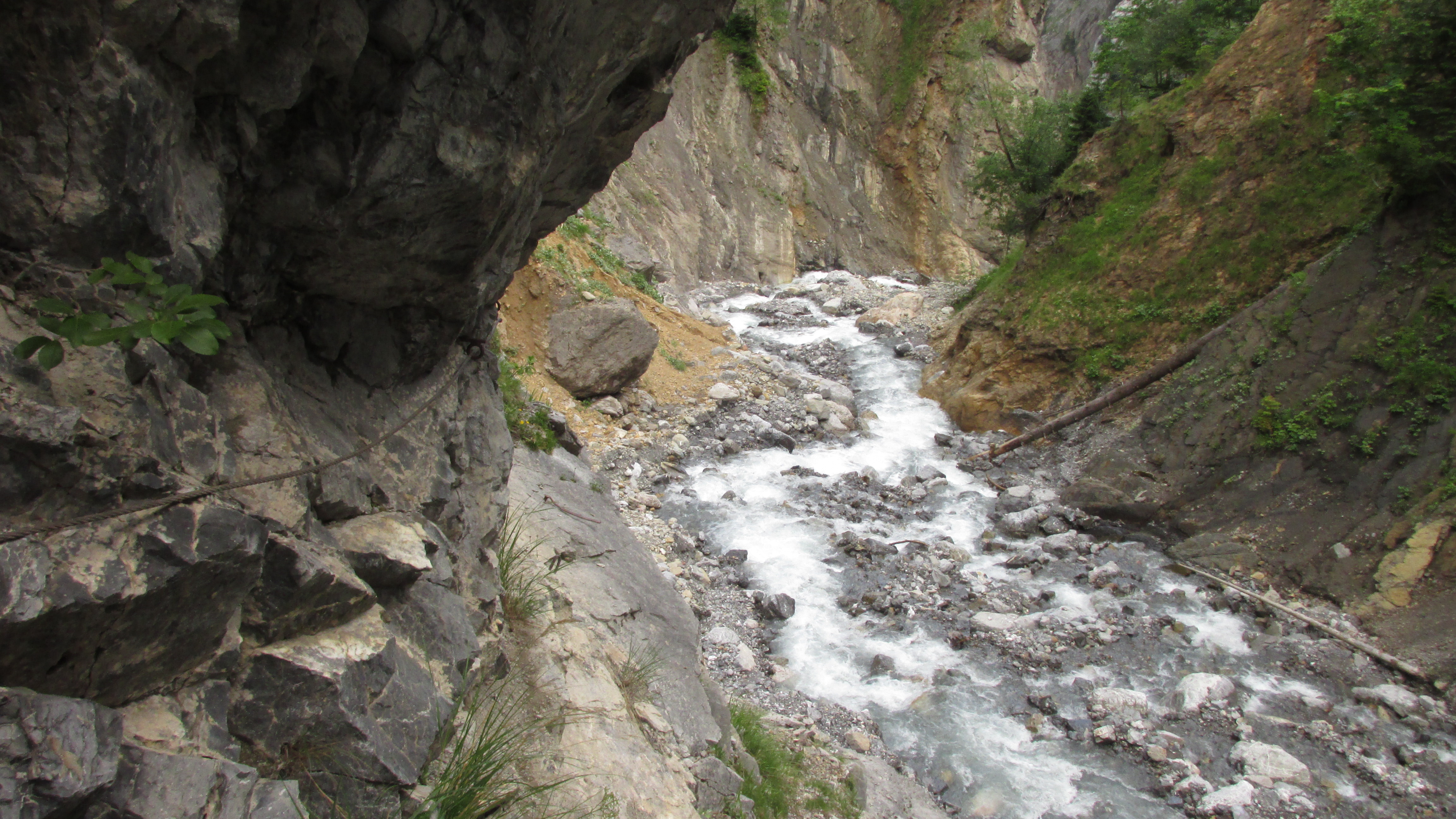 Im Radonatobel. Häufige Felsstürze sind hier typisch.